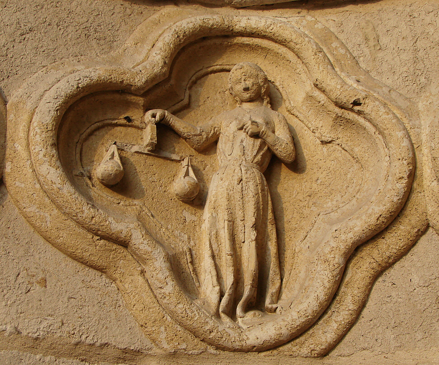 La balance (Libra) ;un des signes du zodiaque complet figurant sur le portail gauche de la façade de la cathédrale d'Amiens.